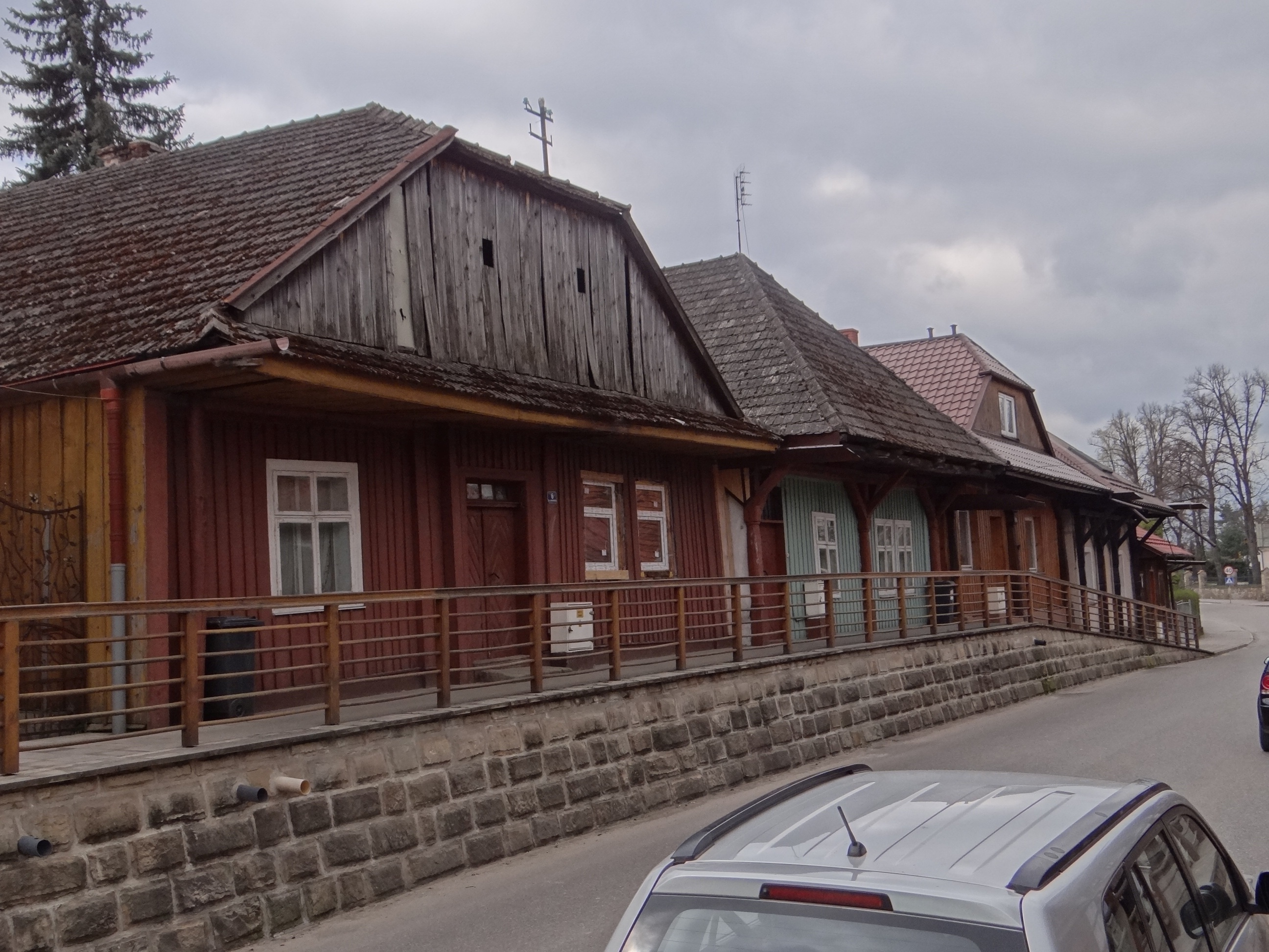 Uliczka w Zakliczynie